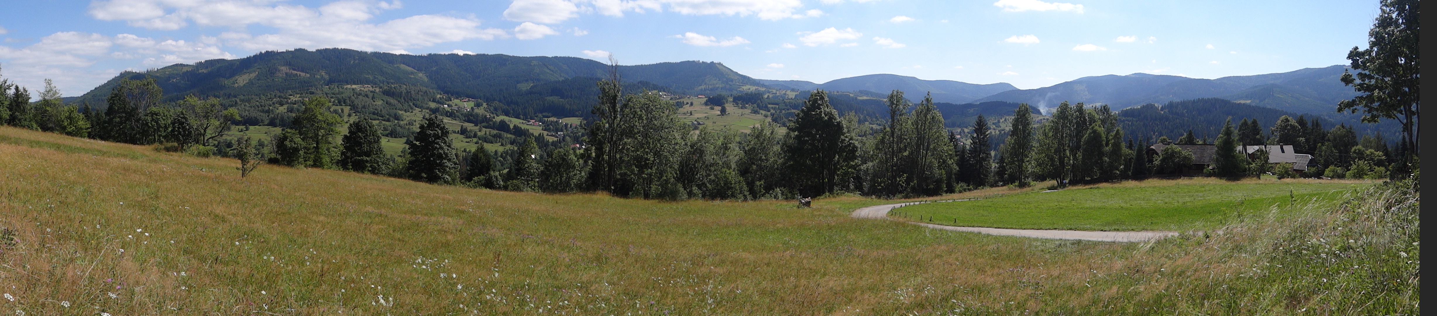 Panorama widokowa z Kubieszówki w miejscowości Glinka